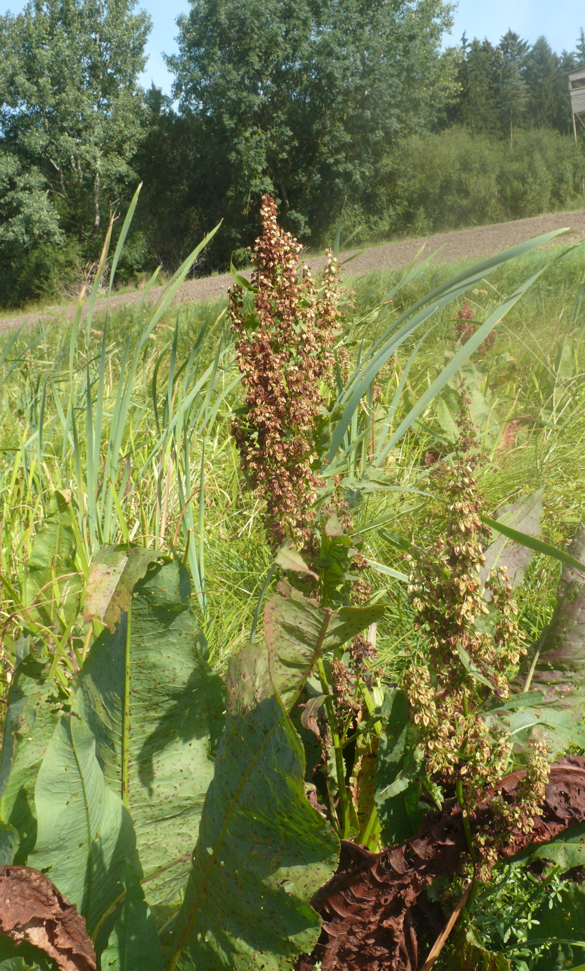 Rumex hydrolapathum, Virngrund, Deutschland